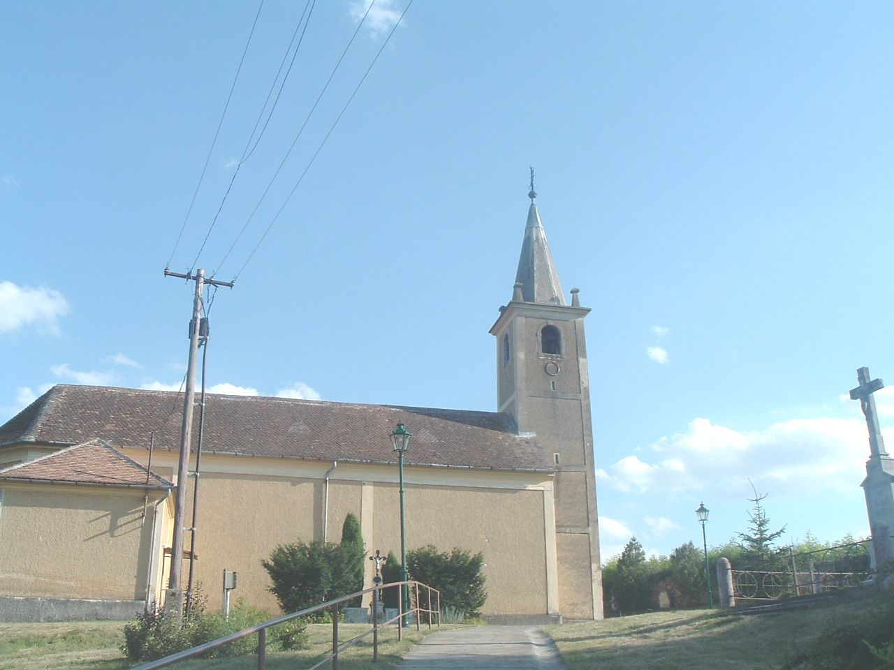 Roman Catholic Church in Peresznye, Hungary. Szent Egyed római katolikus templom, Peresznye